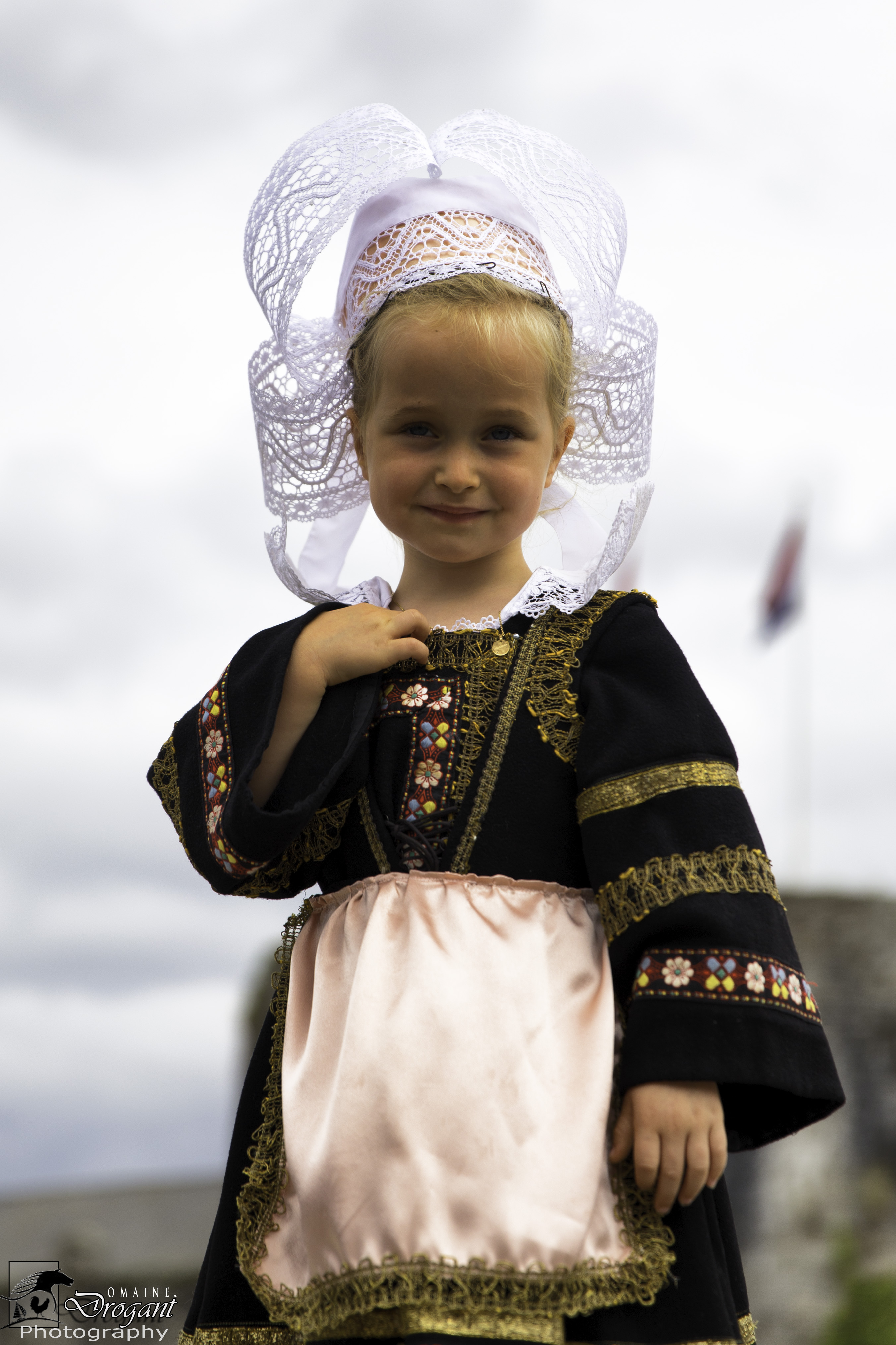 Petite fille en costume de Cornouaille lors du festival Les Filets bleus 2014 à Concarneau.